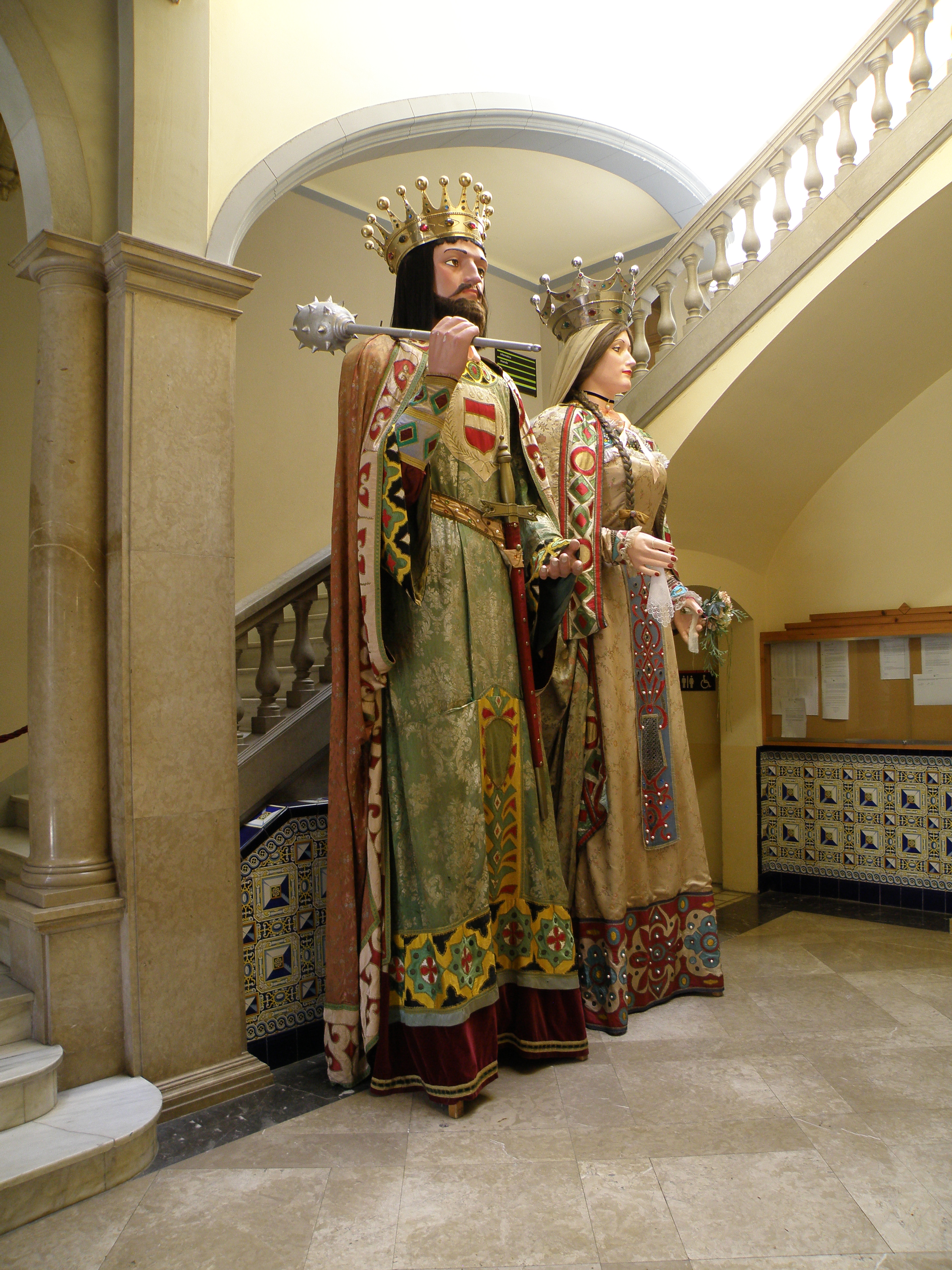 Gegants de Valls (Alt Camp).